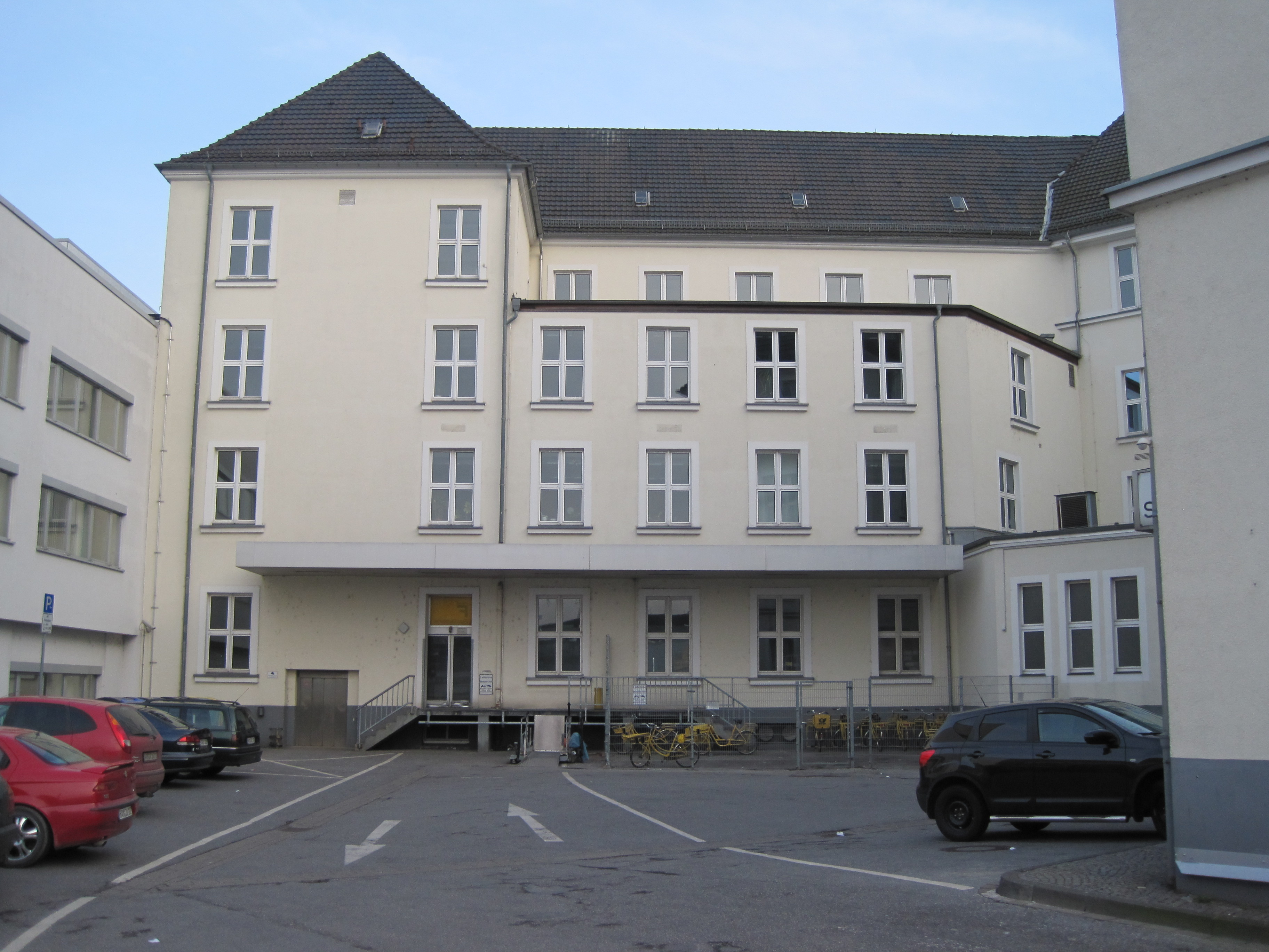 Das Foto zeigt den Paket-Zustellstützpunkt, Teil des Technischen Rathauses Hamm.